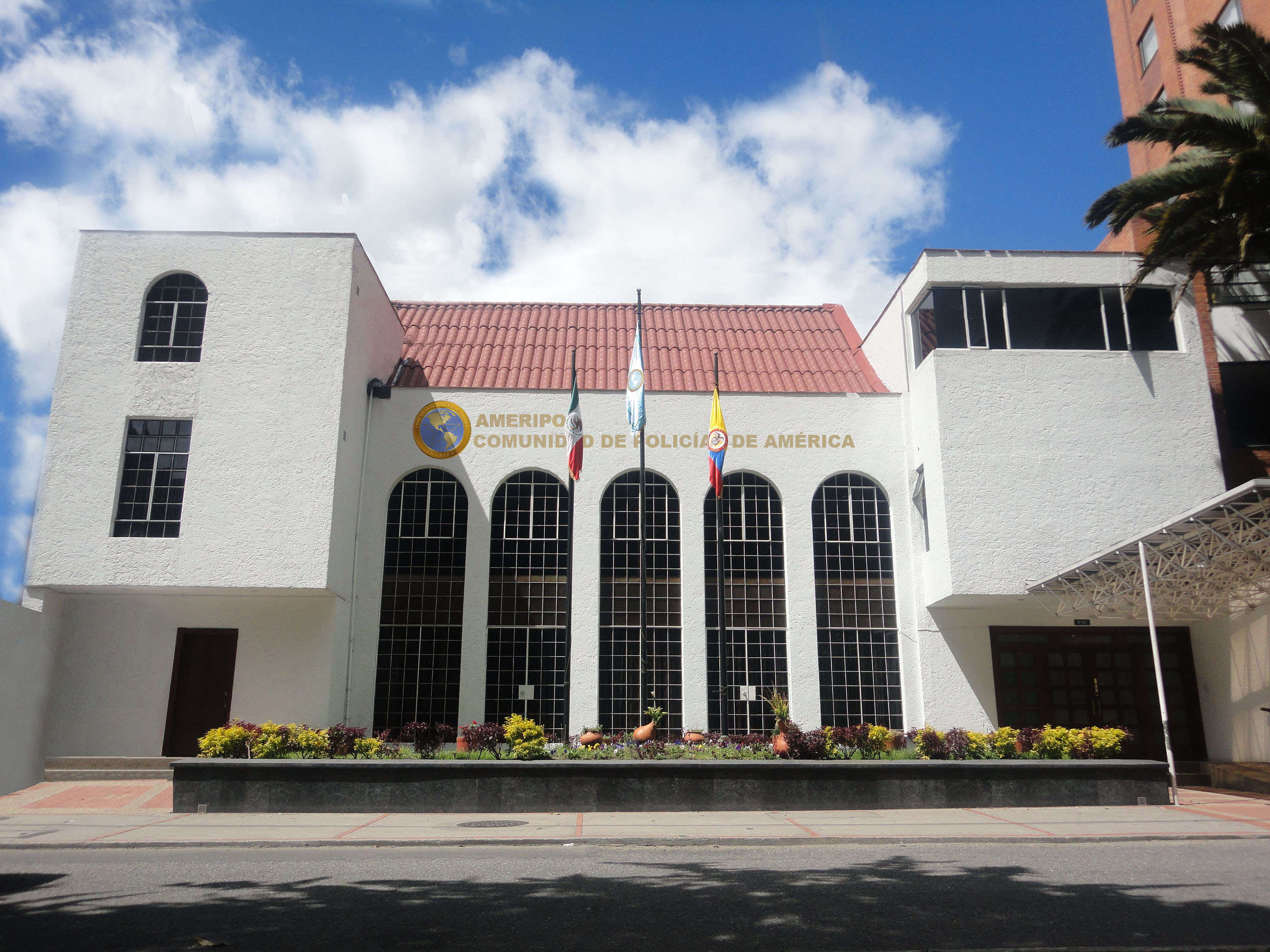 Sede Secretaría Ejecutiva de la Comunidad de Policías de América-AMERIPOL